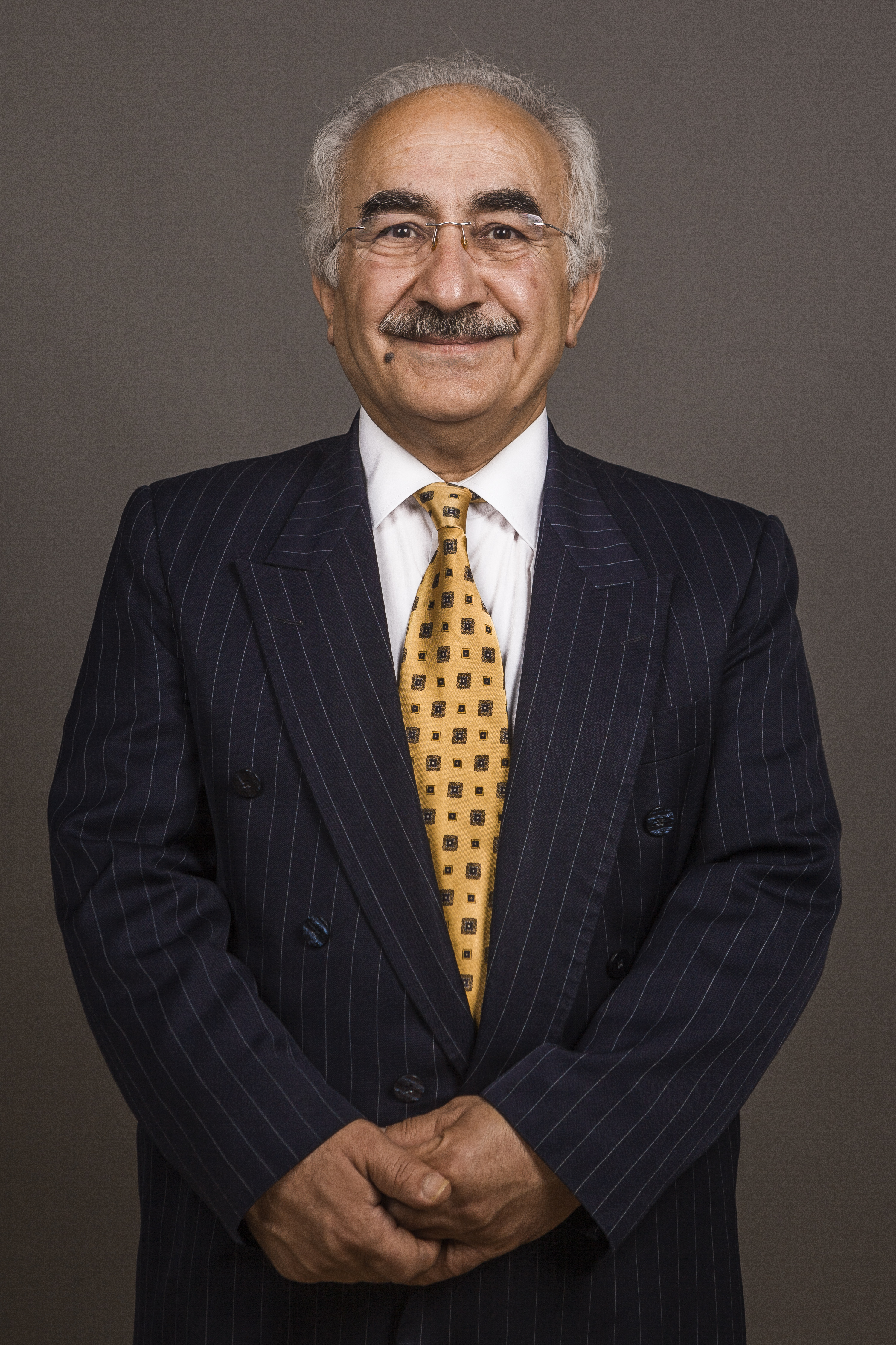 Photographie réalisée par Yekta Uzunoğlu pour sa page Wikipédia.